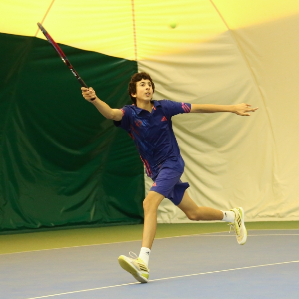 Rayane Roumane